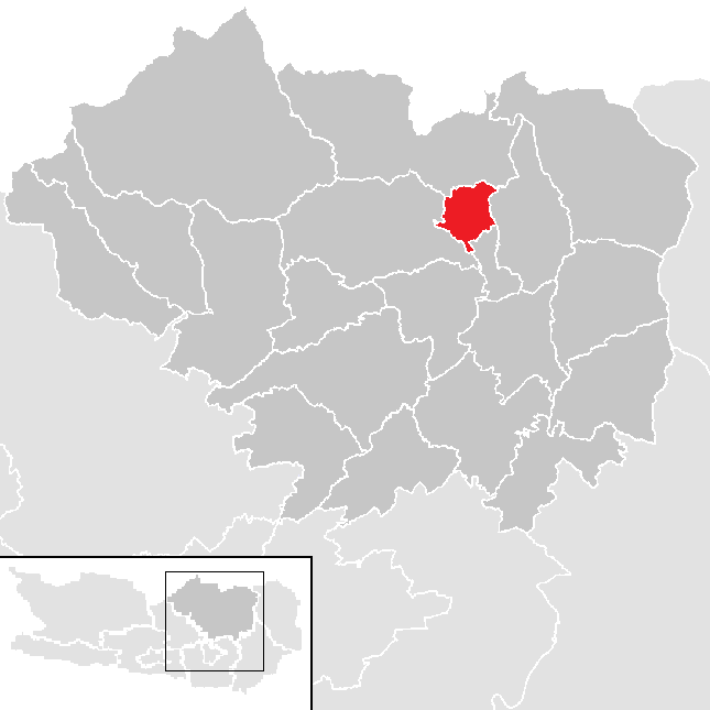 Bezirk Sankt Veit an der Glan